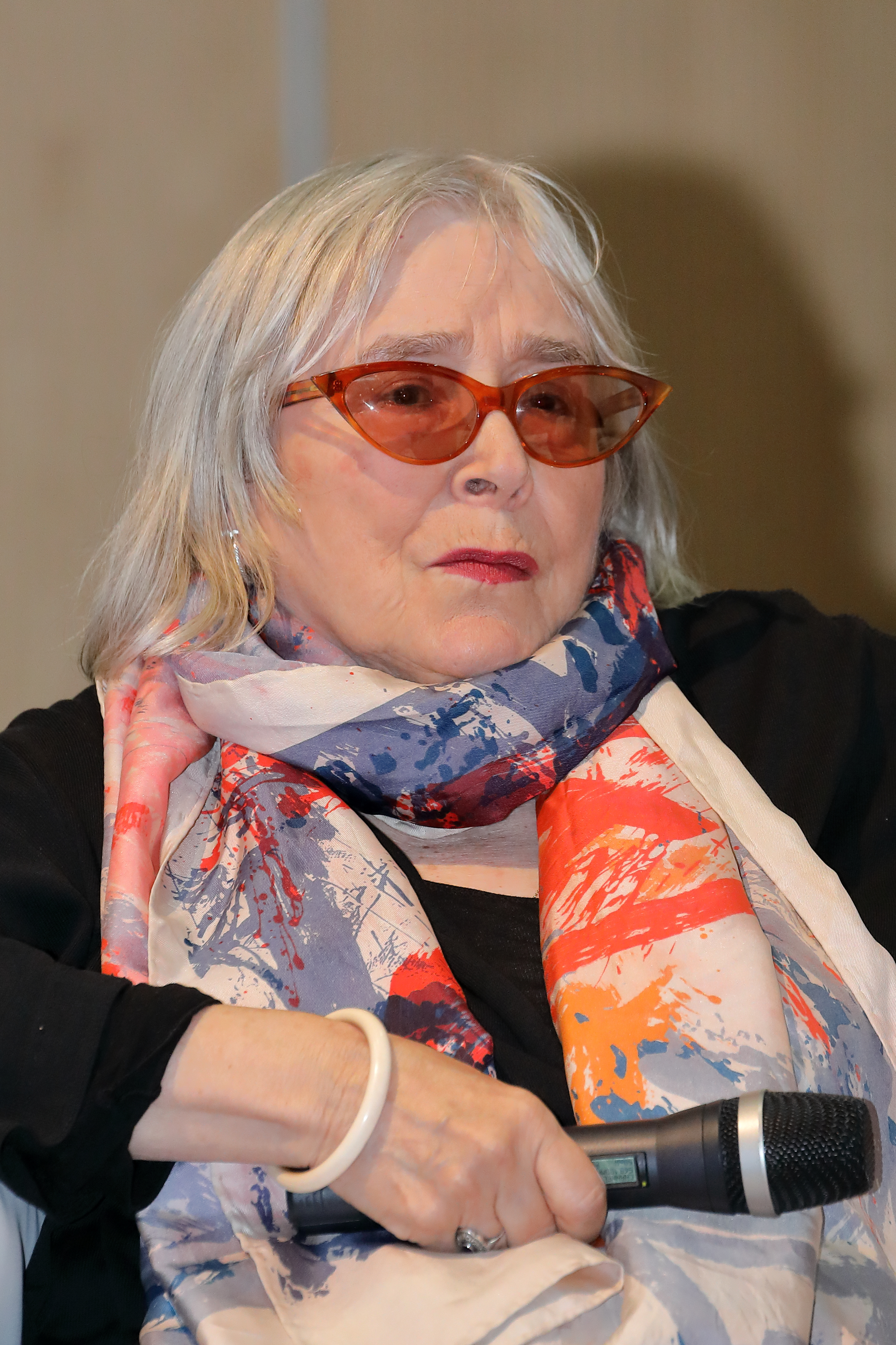 Die österreichische Schauspielerin und Regisseurin Emmy Werner als Gast bei der NEWS-Leselounge der Wiener Buchmesse 2018.